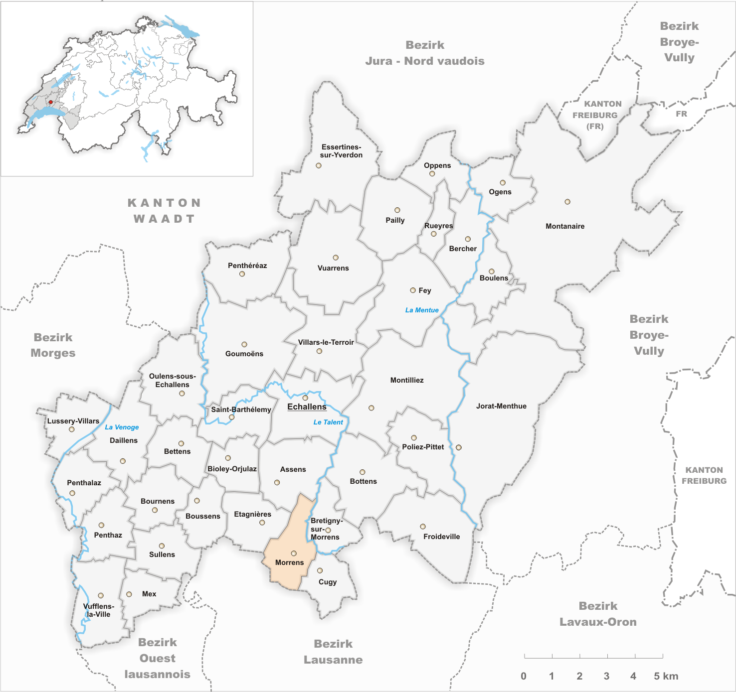 Municipality Morrens